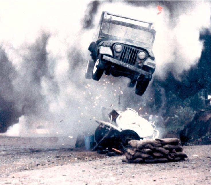 מתוך לוחמי החופש של ריקי שלח אפריקה 1986 צילום דויד גור